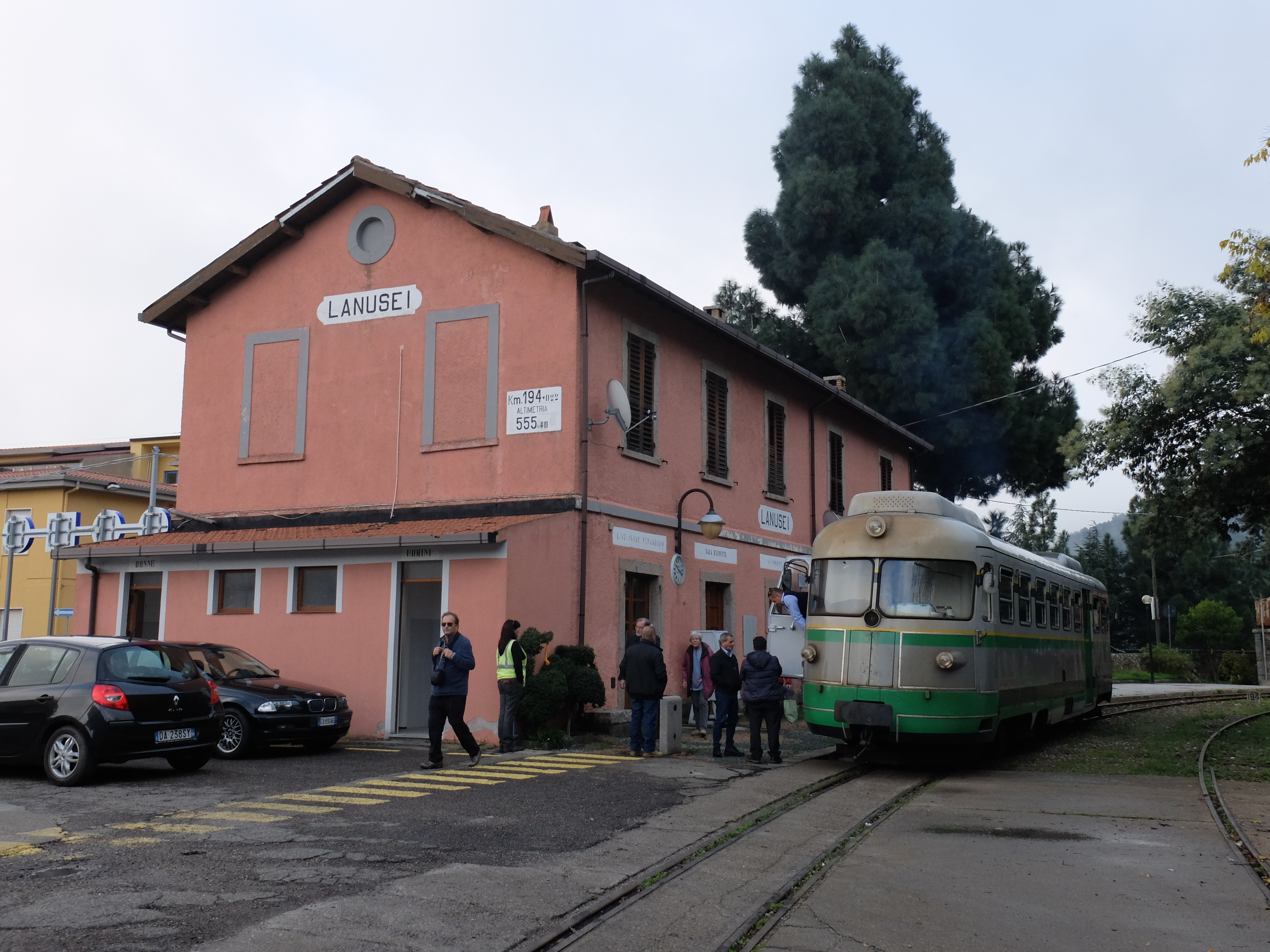 Bahnhof Lanusei mit ADe.05